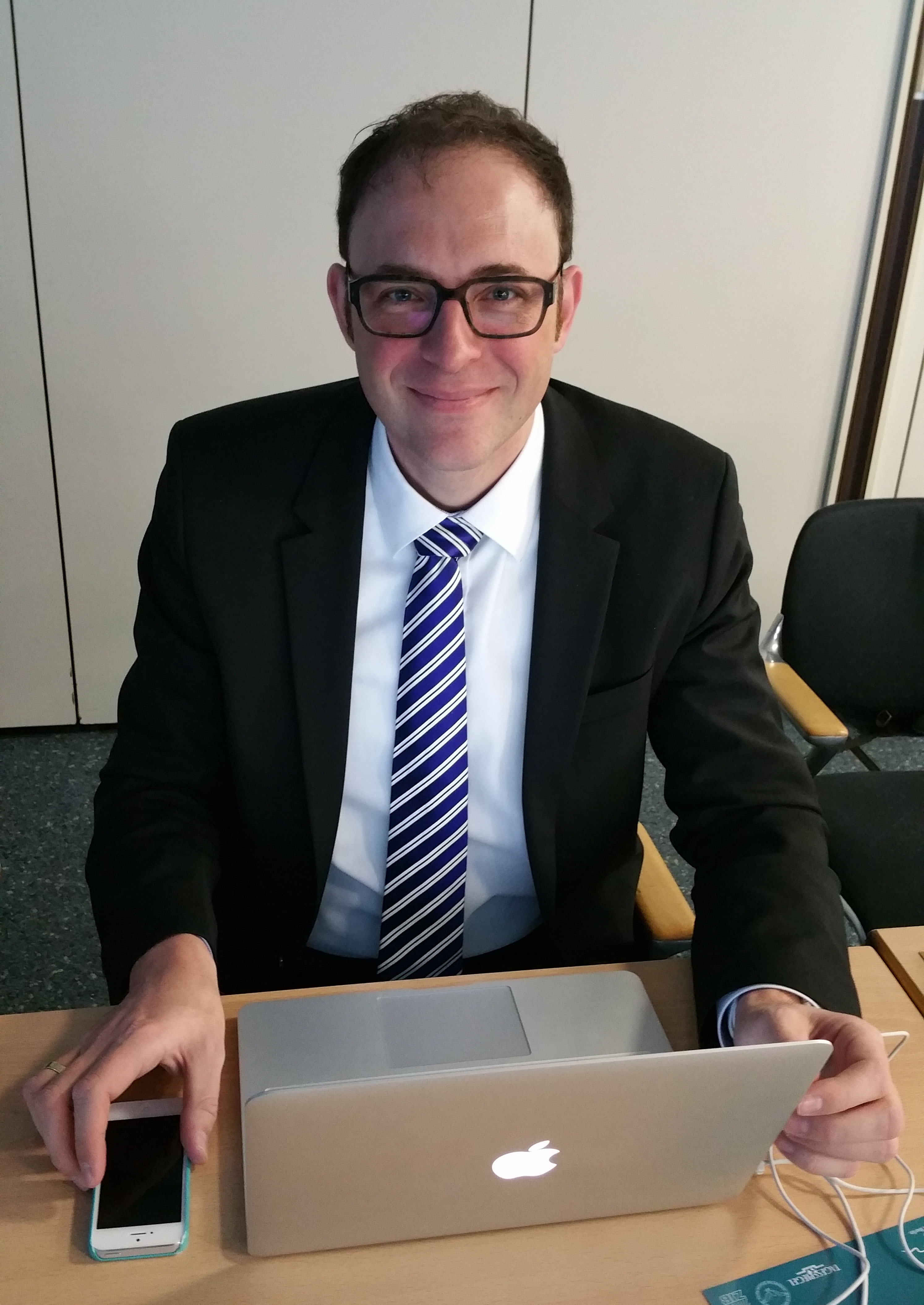 Prof. Dr. Hans-Joachim Hof im Jahr 2016 auf einer Präsidiumssitzung der Gesellschaft für Informatik